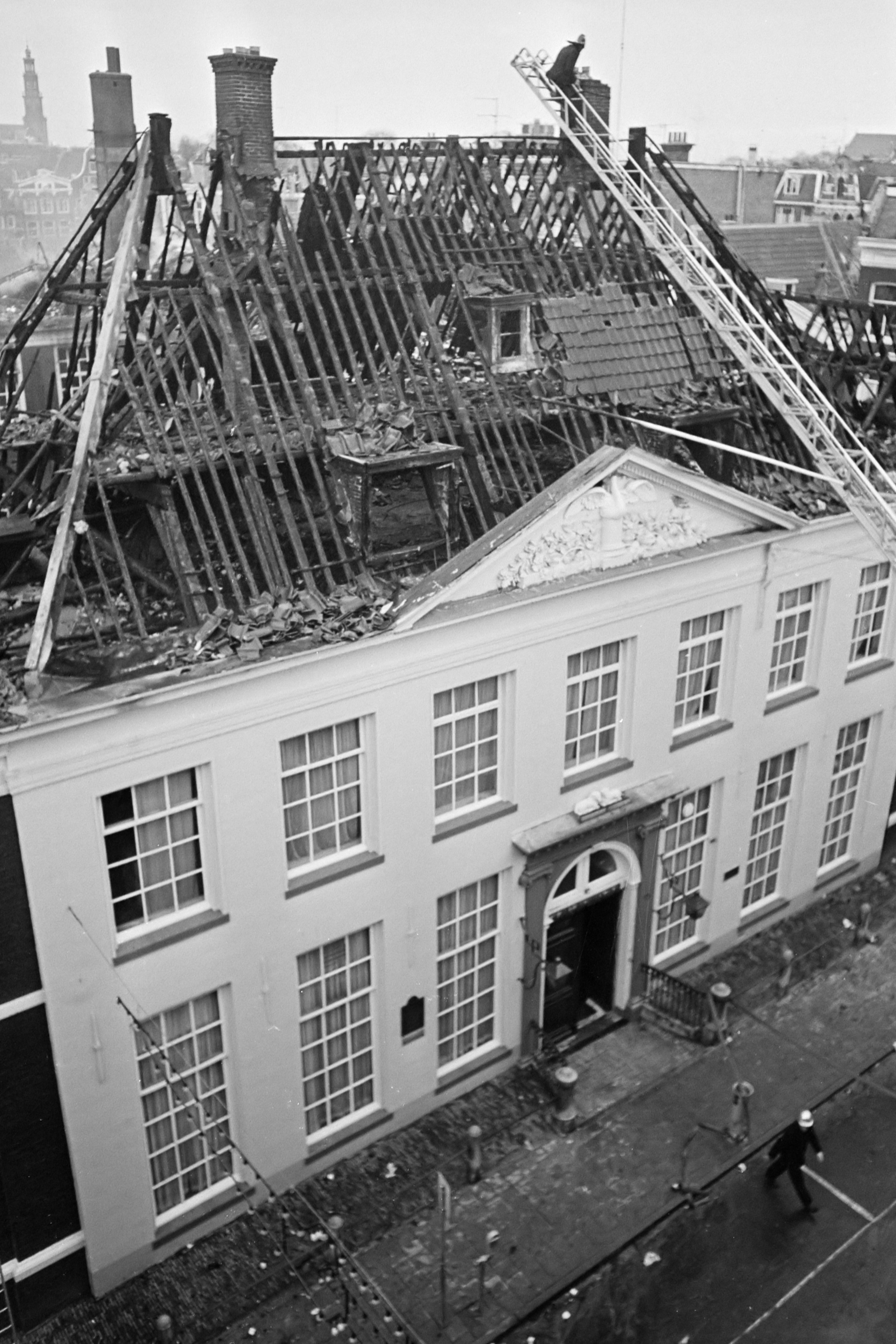 Pand van Westindische Compagnie op Amsterdamse Herenmarkt uitgebrand; het pand met totaal vernield dak 17 december 1975